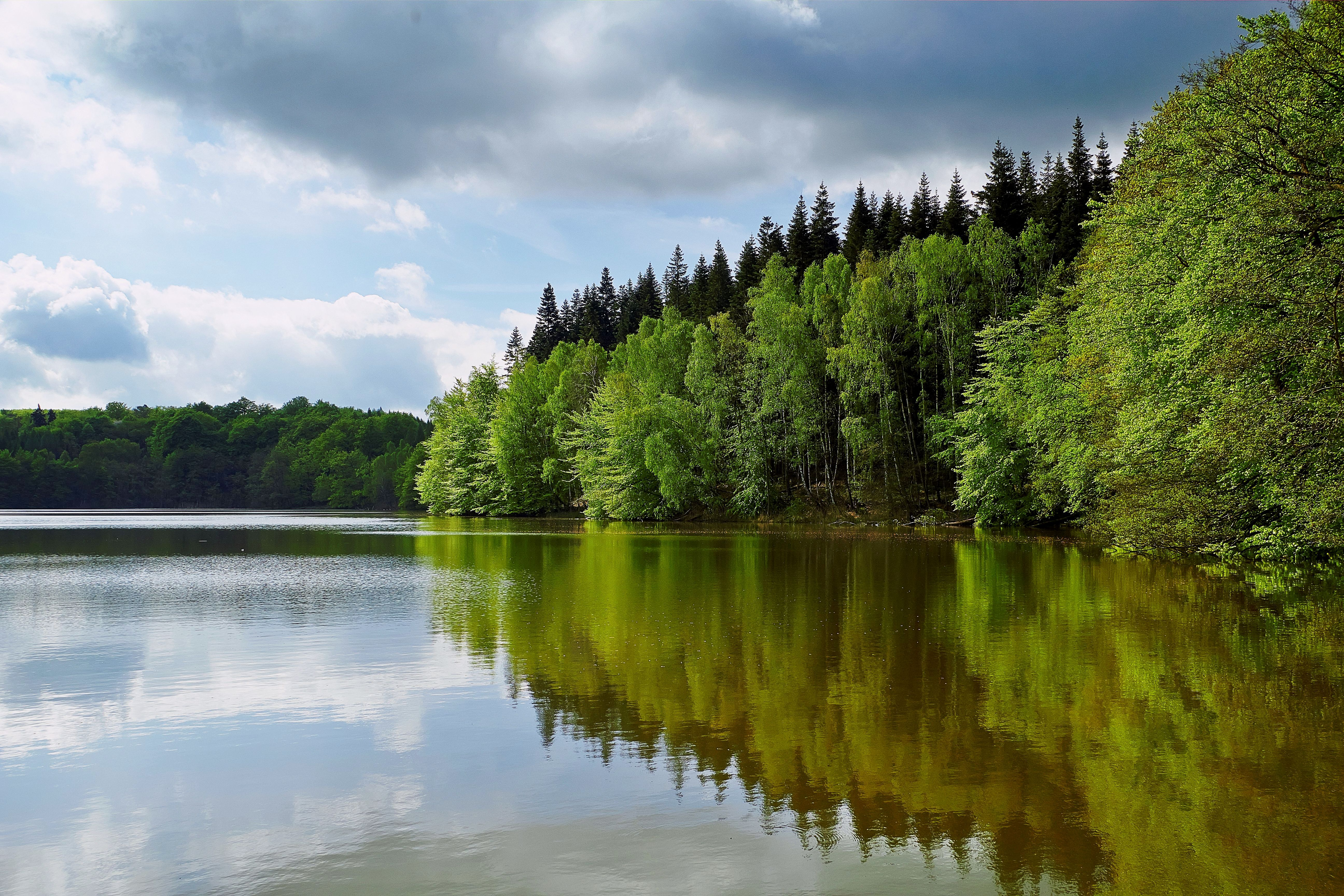 NSG Jungfernheide: Krienkowsee, Naturpark Uckermärkische Seen